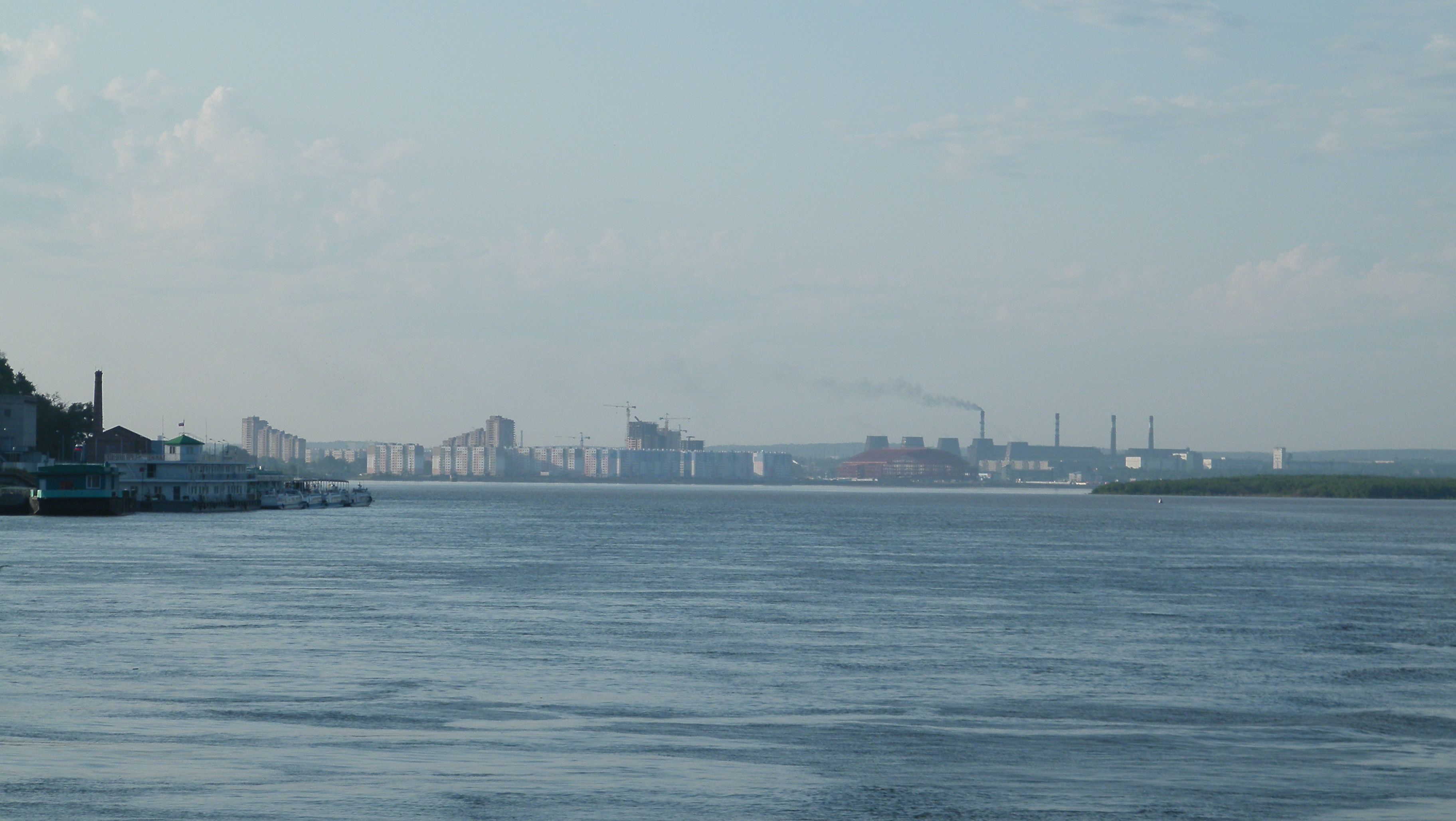 Впадение Амурской протоки в Амур, вид с Хабаровского утеса